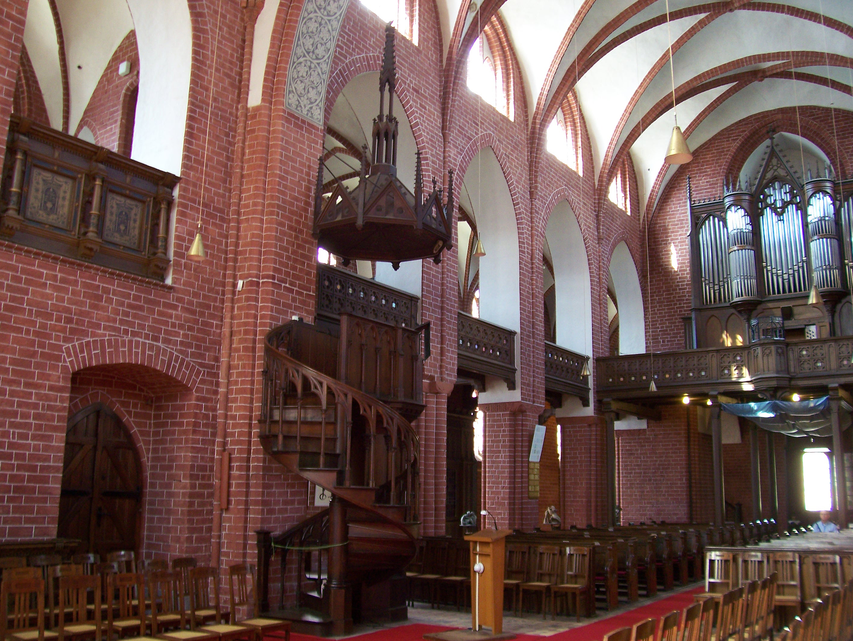 Blick ins Innere der Maria-Magdalenen-Kirche in Eberswalde, Brandenburg